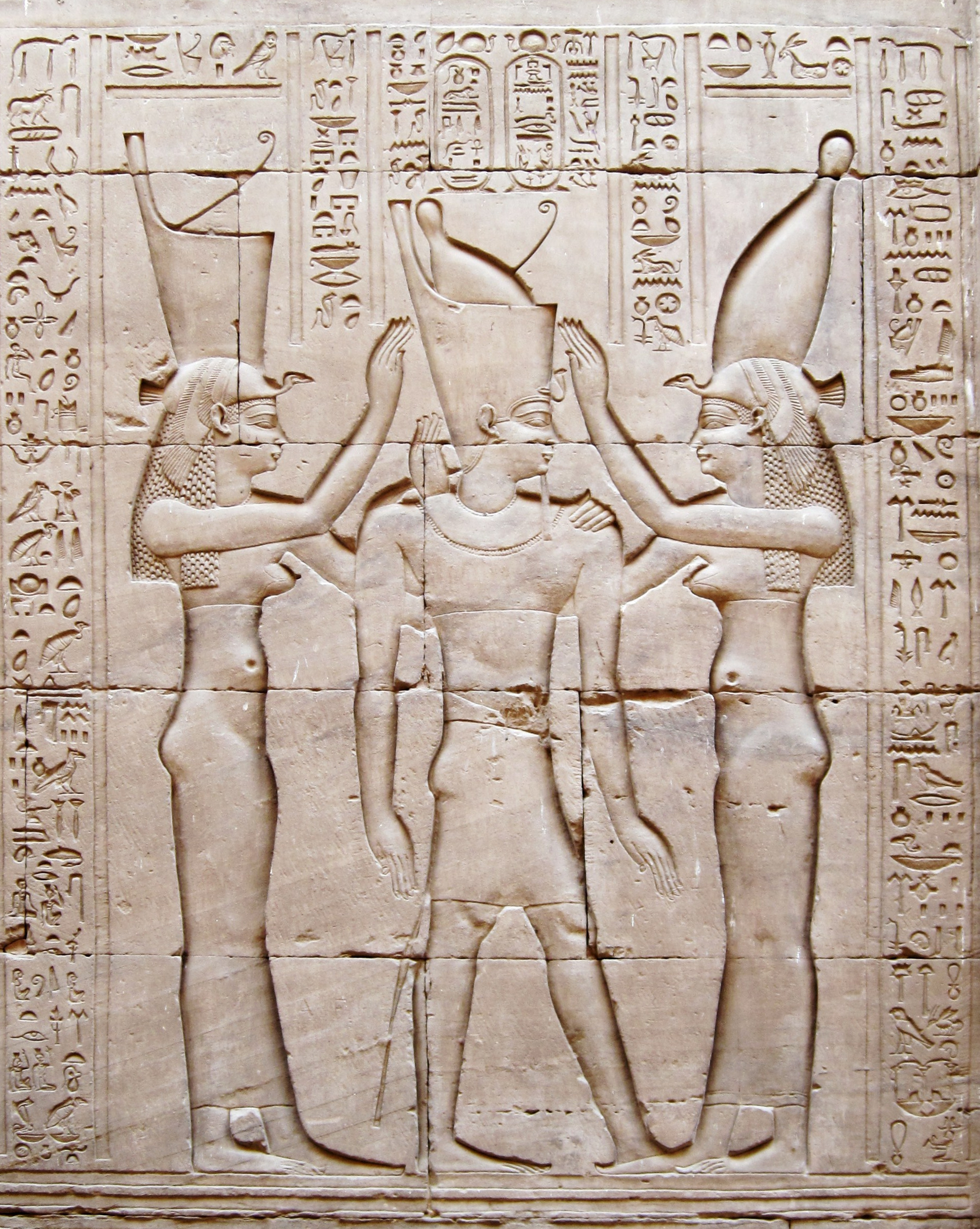 Pharao Ptolemaios VIII., zwischen den Göttinnen Wadjet von Unterägypten (links) und Nechbet von Oberägypten (rechts), Wandrelief im Tempel von Edfu, Ägypten